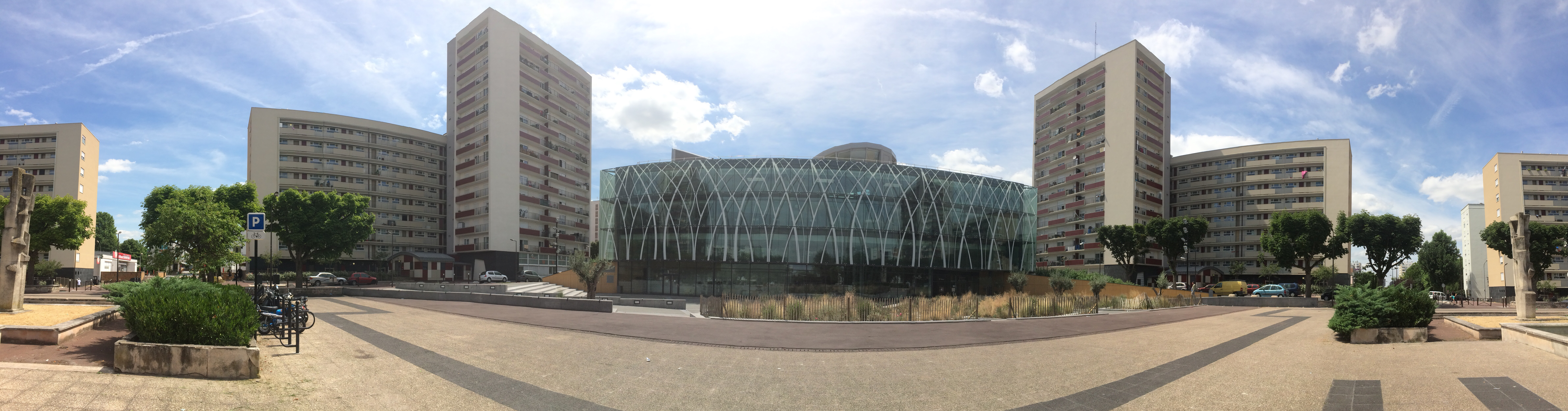 Médiathèque Nelson Mandela située place de l'Abbaye à Créteil (94)